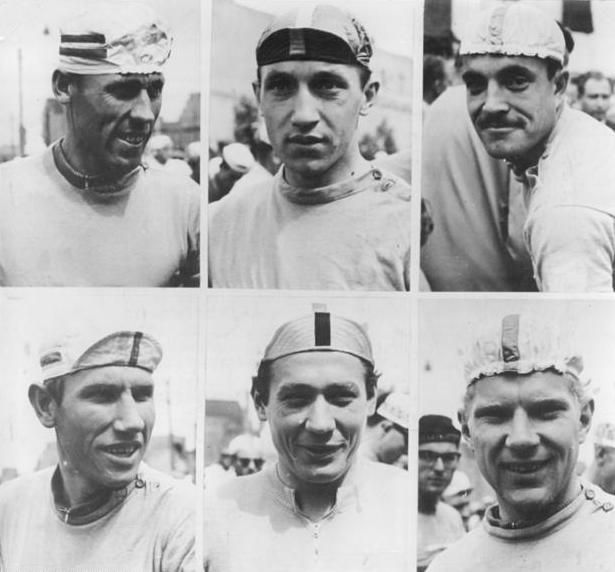 Friedensfahrt, Mannschaft der UdSSR Zentralbild Wendorf 5.5.1961 XIV. Internationale Friedensfahrt Warschau-Berlin-Prag 1961. Die sowjetischen Fahrer vlnr Obere Reihe Viktor Kapitonow, Stanislaw Moskwin, Gainam Saidchushin, unteer Reihe vlnr: Anatoli Tscherepowitsch, Juri Melichow, Alemeij Petrow.Tableau.